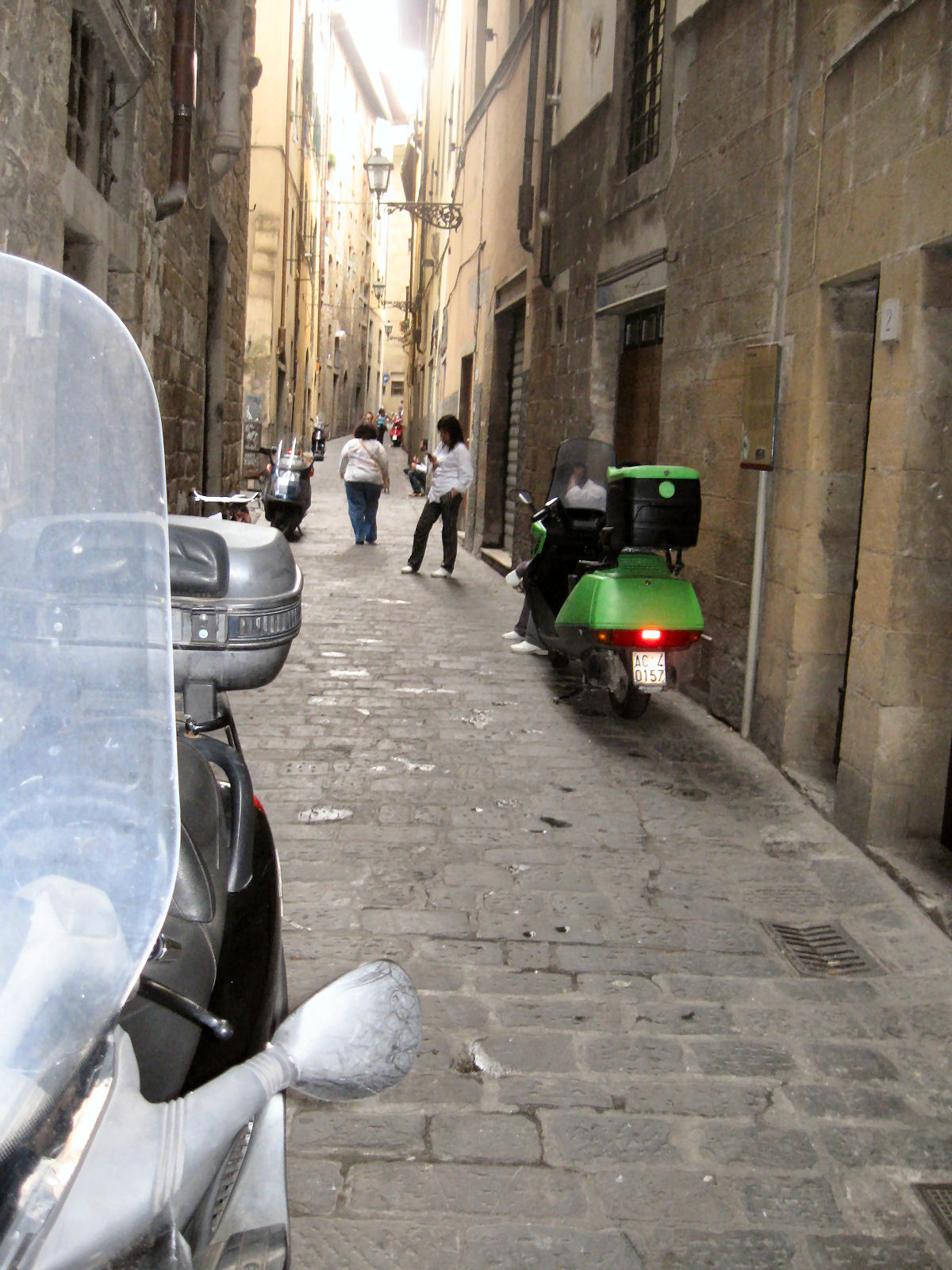 רחוב היהודים בפירנצה לשעבר